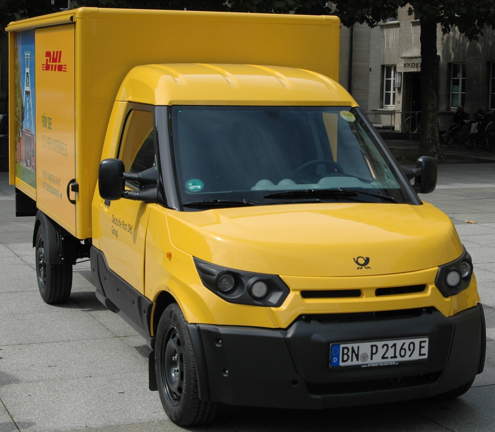 Streetscooter für die Umweltzone Bochum